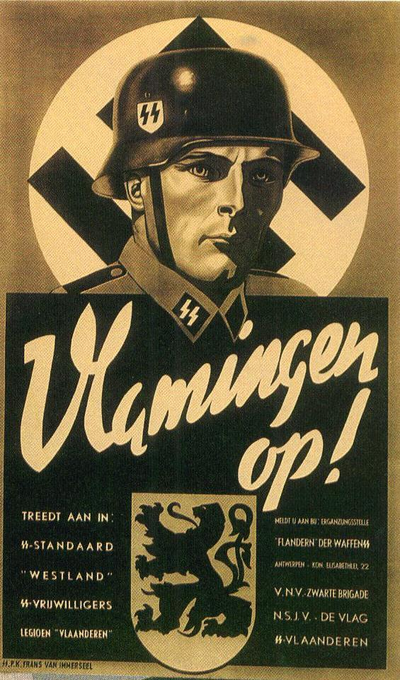 Rekruteringsaffiche Algemeene-SS Vlaanderen